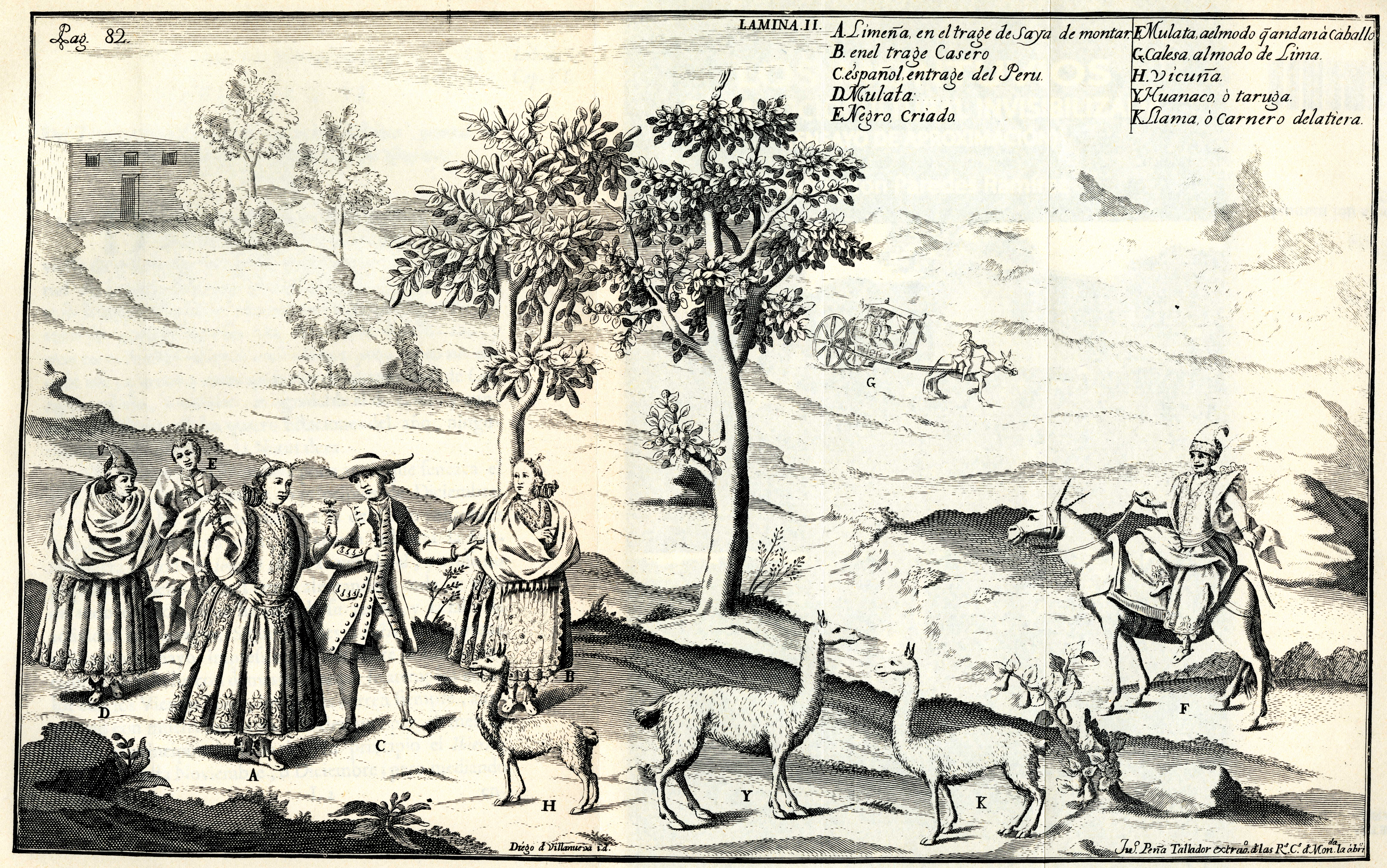 De Ulloa, Antonio y Jorge Juan. Relación Histórica del Viaje a la América Meridional, hecho de Orden de Su Majestad Católica para medir algunos Grados de Meridiano Terrestre, y venir por ellos en conocimiento de la verdadera Figura y Magnitud de la Tierra, con otras varias Observaciones Astronómicas y Físicas. Por Don Jorge Juan Comendador de Aliaga, en la Orden de San Juan, Socio correspondiente de la Real Academia de las Ciencias de París y Don Antonio de Ulloa de la Real Sociedad de Londres: ambos Capitanes de Fragata de la Real Armada. Segunda Parte / Tomo II. Impresa por la Orden del Rey Nuestro Señor en Madrid por Antonio Marín, Año de MCDDXLVIII (1748). Diapositiva de Consulta y acceso publico cuya información fue investigada de un libro y/o ejemplar de revisión custodiado en los Fondos Bibliográficos (Sección Siglo XVIII o Etapa Colonial) del Archivo Histórico del Guayas; Guayaquil, Ecuador. Compartido y consultado usuario J. Javier García A.